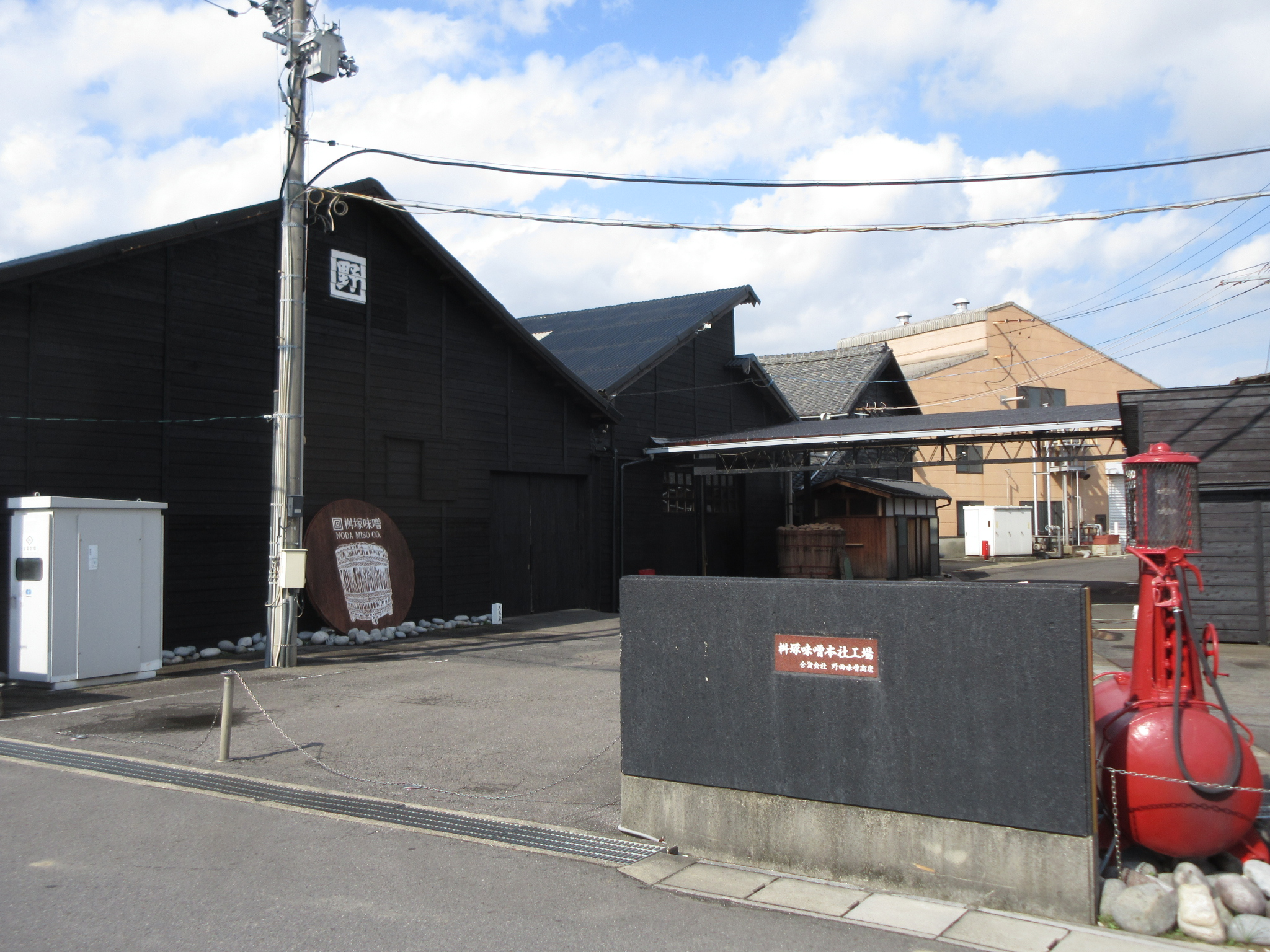 野田味噌商店（豊田市桝塚西町）